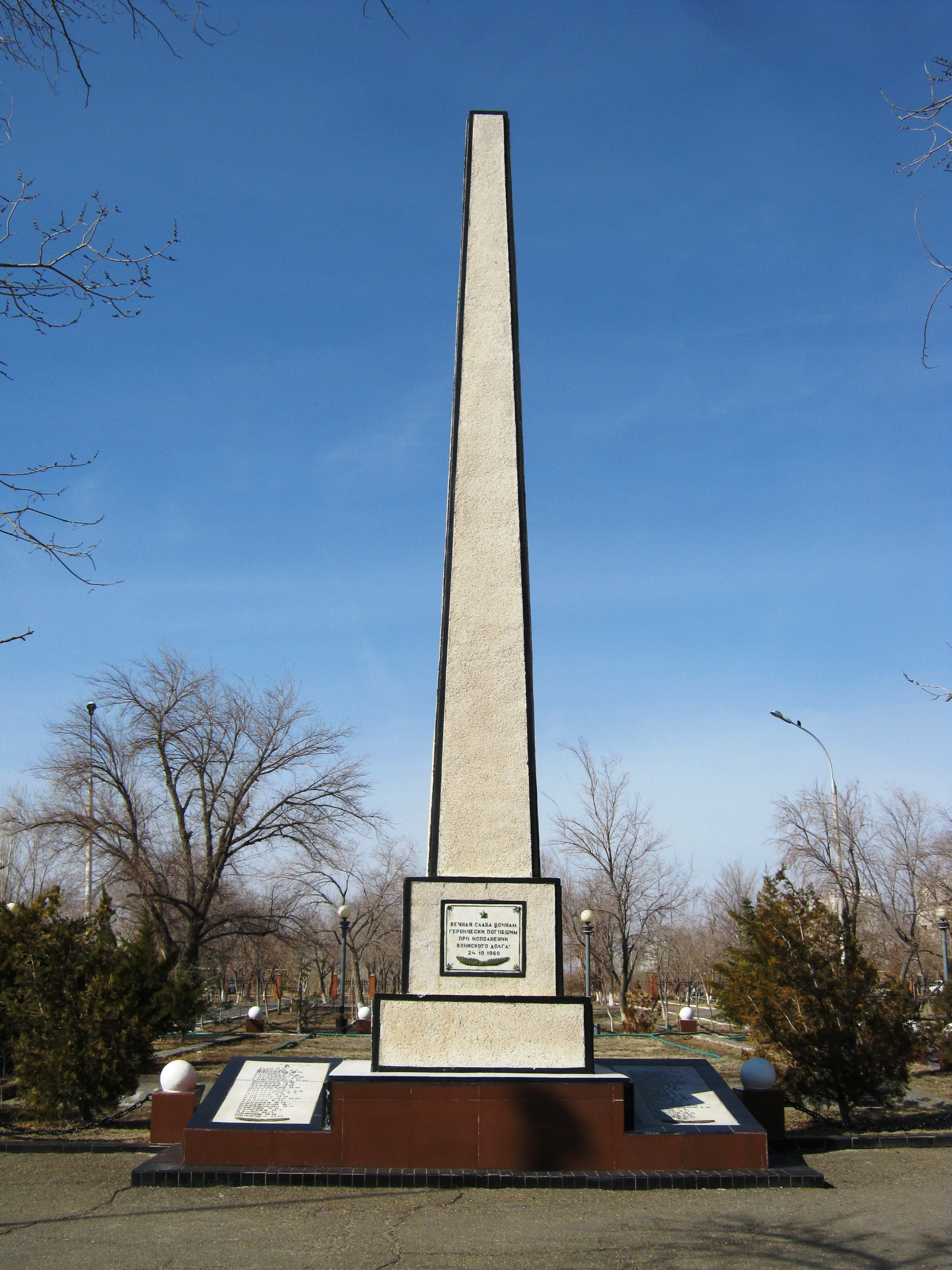 Памятник ракетчикам, погибших при взрыве ракеты Р-16 24 октября 1960 года (Байконур)